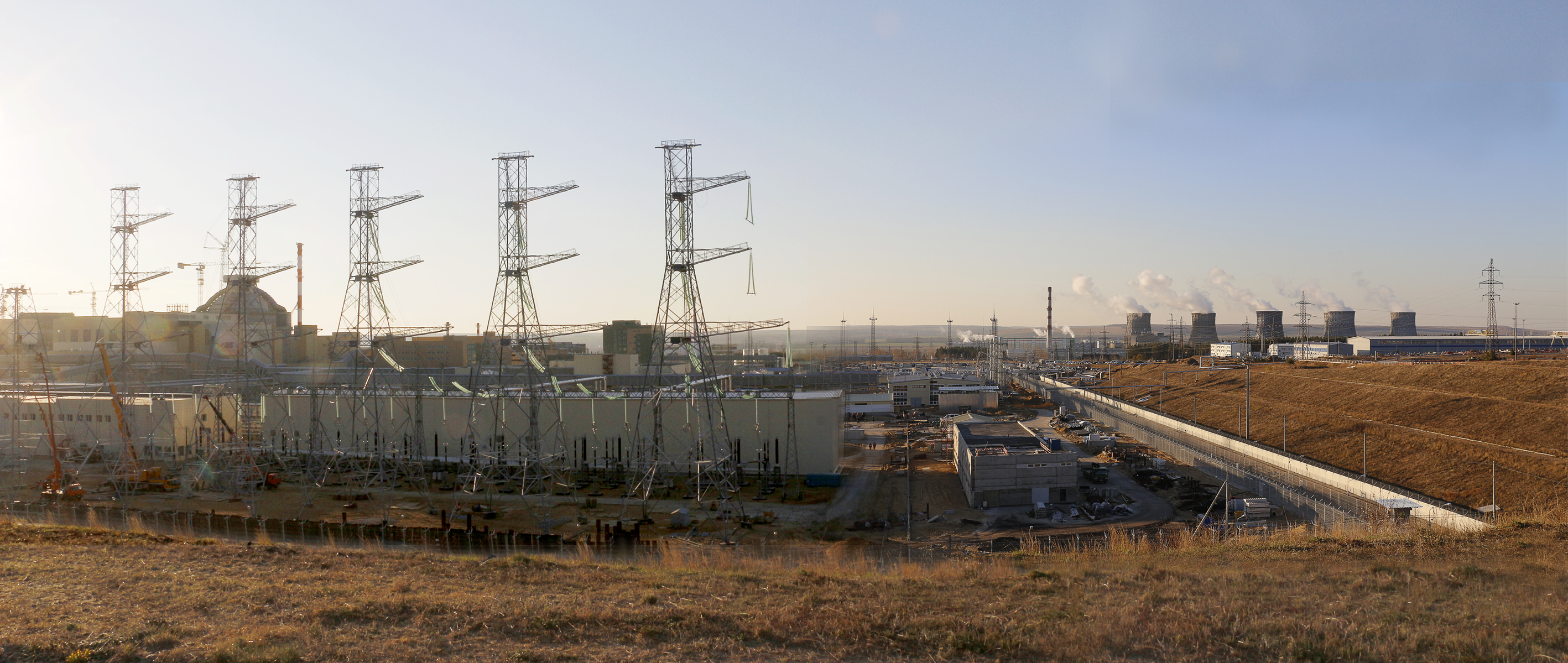 Строительство НВ АЭС-2. Стройплощадка Нововоронежской АЭС-2 на фоне Нововоронежской АЭС